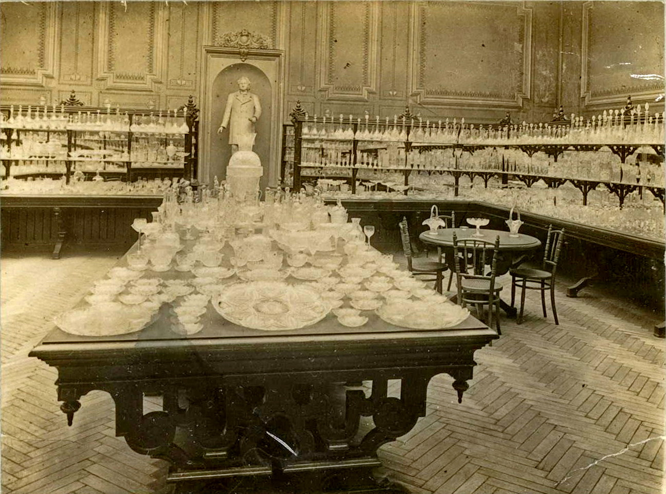 Collectie / Archief : Fotocollectie Arbeidsinspectie Reportage / Serie : Kristalfabriek De Sphinx Beschrijving : Kristalfabriek; toonzaal van fijn glaswerk in de Timmerfabriek. Datum : ongedateerd Locatie : Limburg, Maastricht Trefwoorden : glasindustrie, glaskunst, kunstnijverheid Instellingsnaam : Kristalunie Fotograaf : [onbekend] Auteursrechthebbende : Nationaal Archief Materiaalsoort : Foto (zwart/wit) Nummer archiefinventaris : bekijk toegang 2.24.03 Inventarisnummer : 1678 Bestanddeelnummer : 256-3973